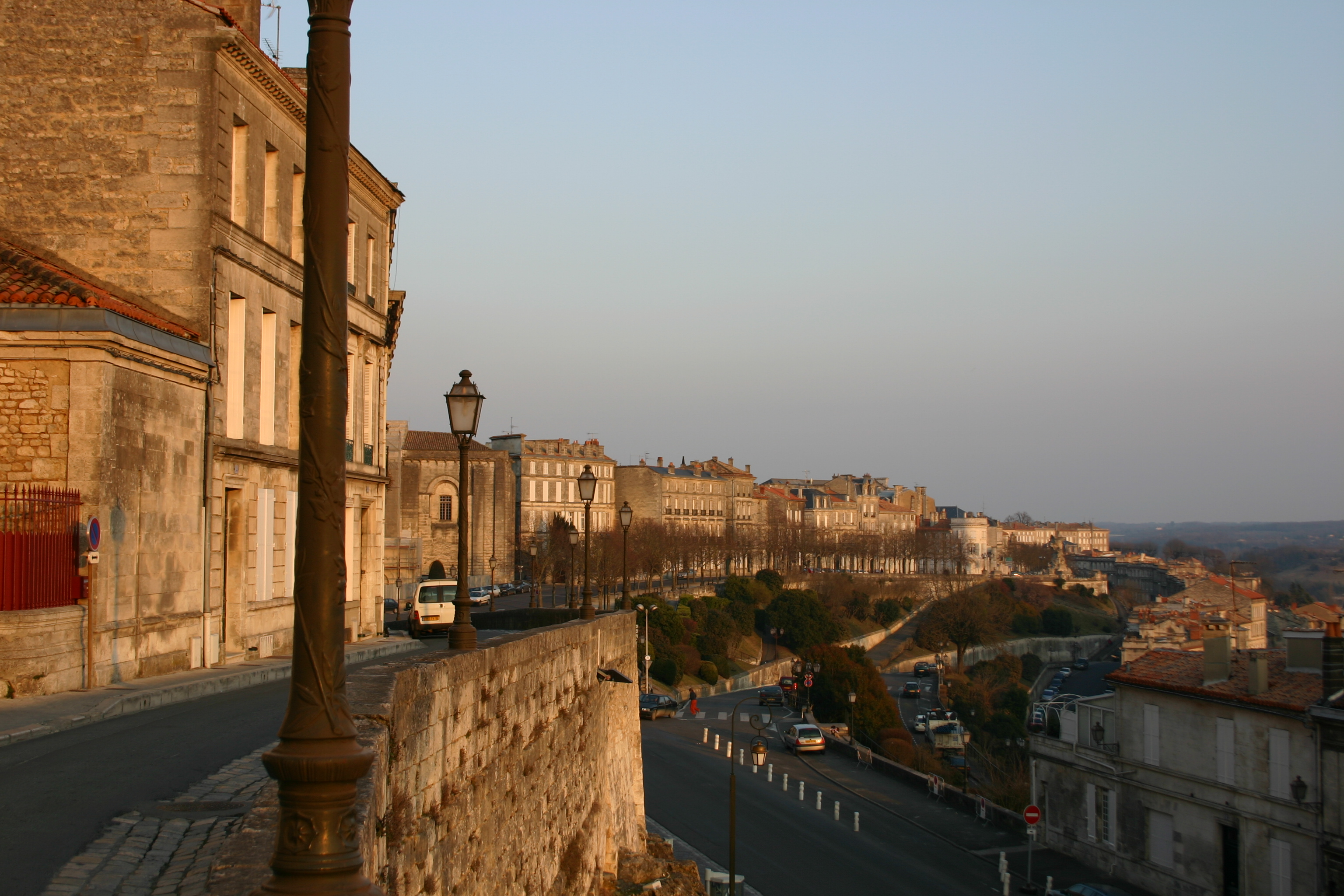 Angoulême, Charente département, France.